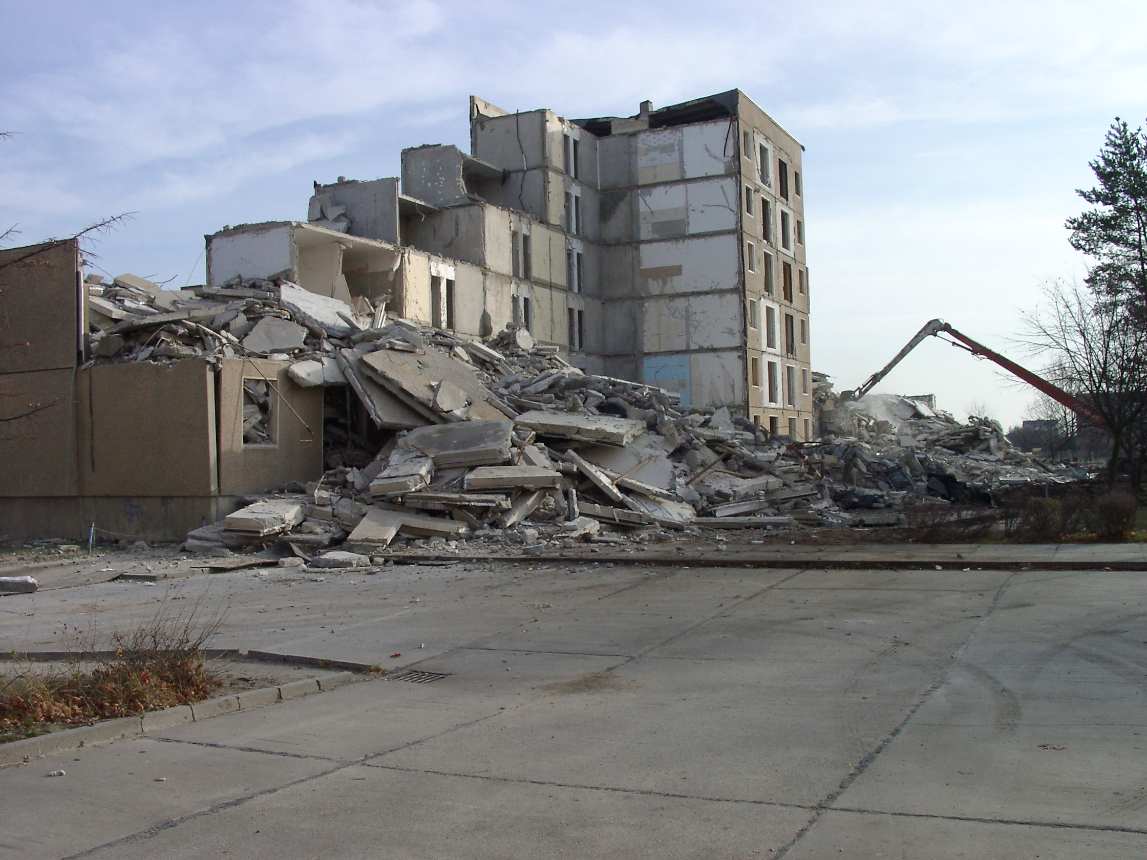 Flächenabriss von Plattenbauwohngebieten im sächsischen Weißwasser